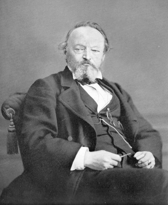 Johann Christian Gustav Lucae, deutscher Anatom und Pathologe. Fotografie um 1876